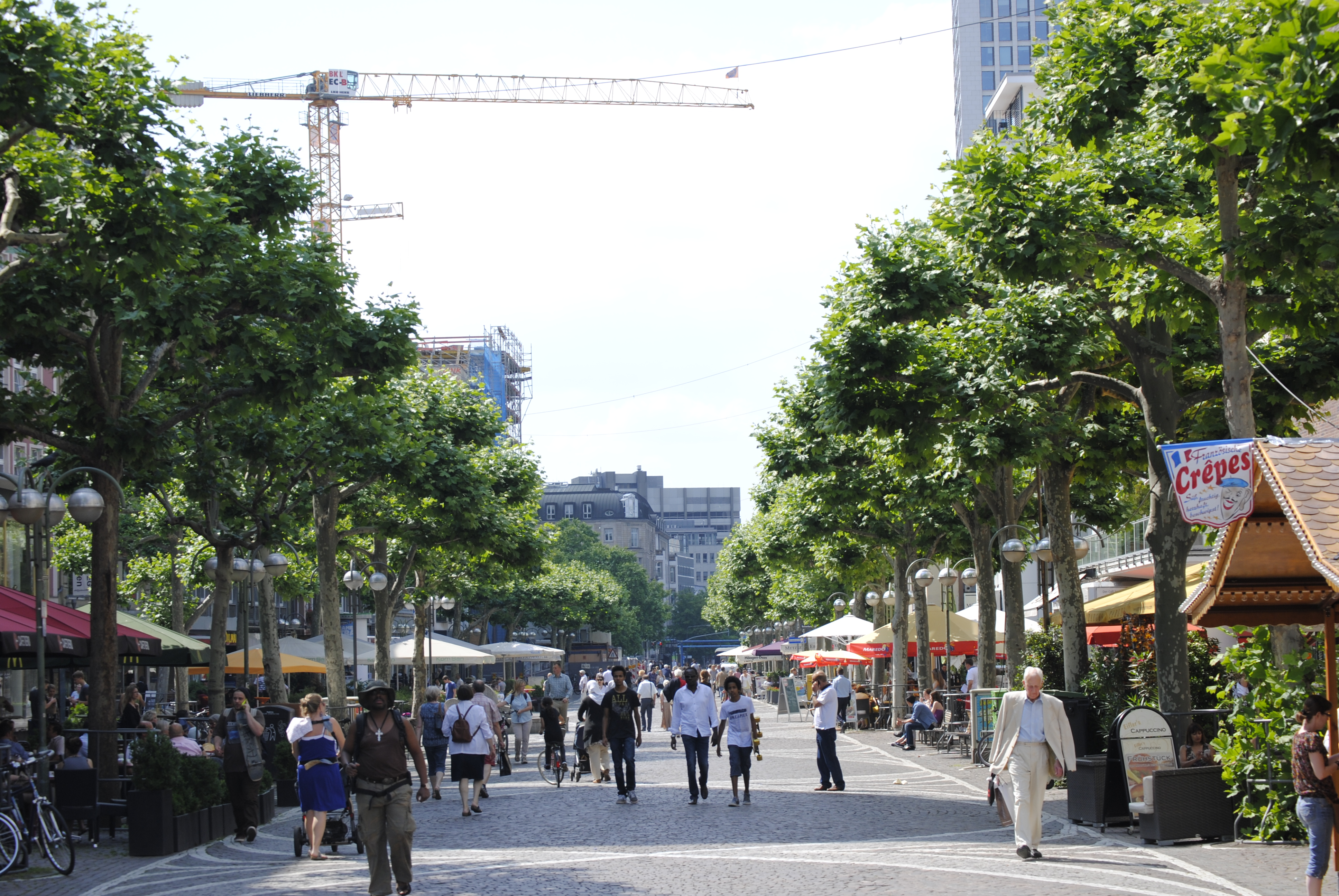 Die Freßgass